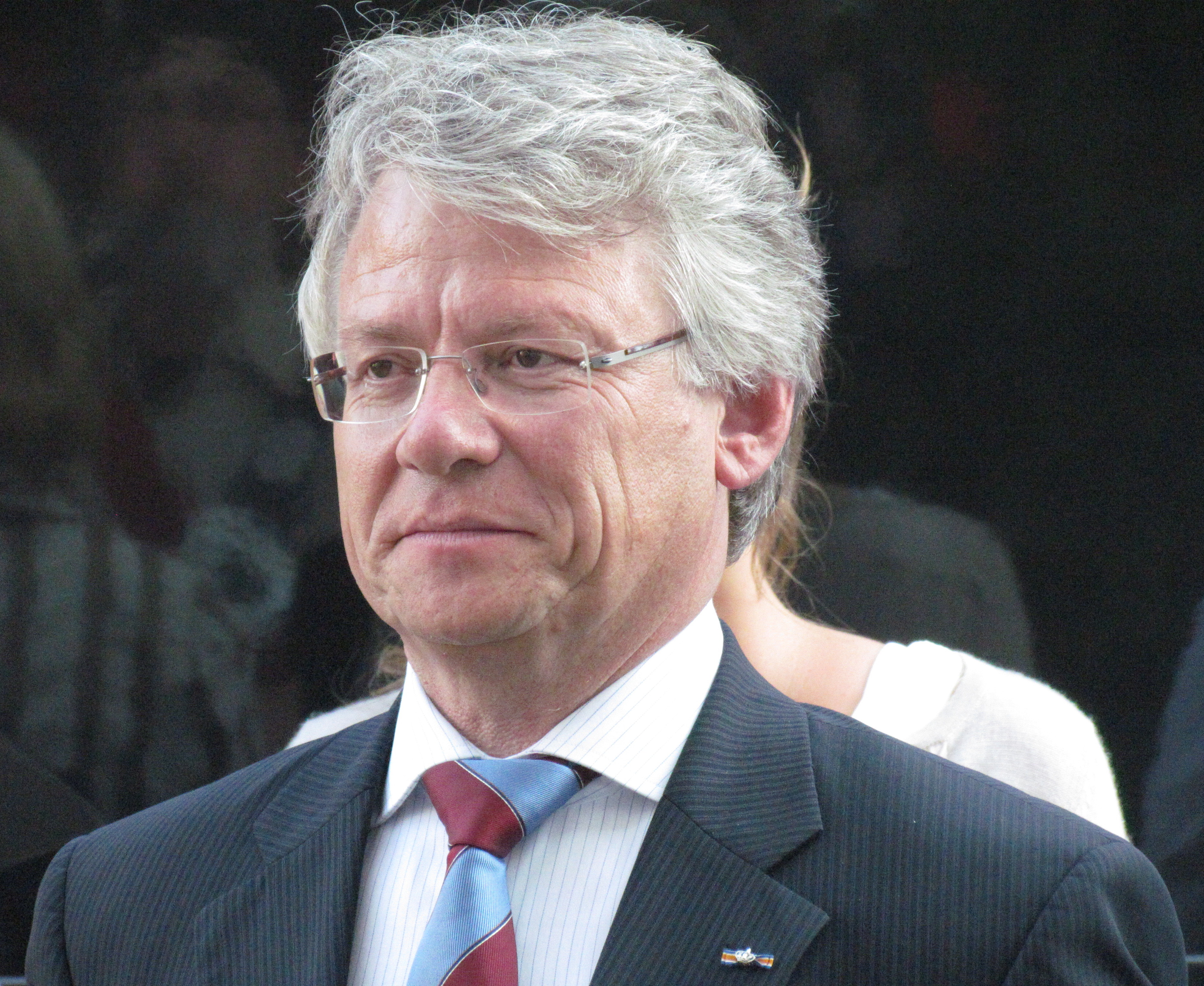 John Berends (NL), oud-burgemeester van Harderwijk, een halfuur voor zijn beëdiging tot burgemeester van Apeldoorn